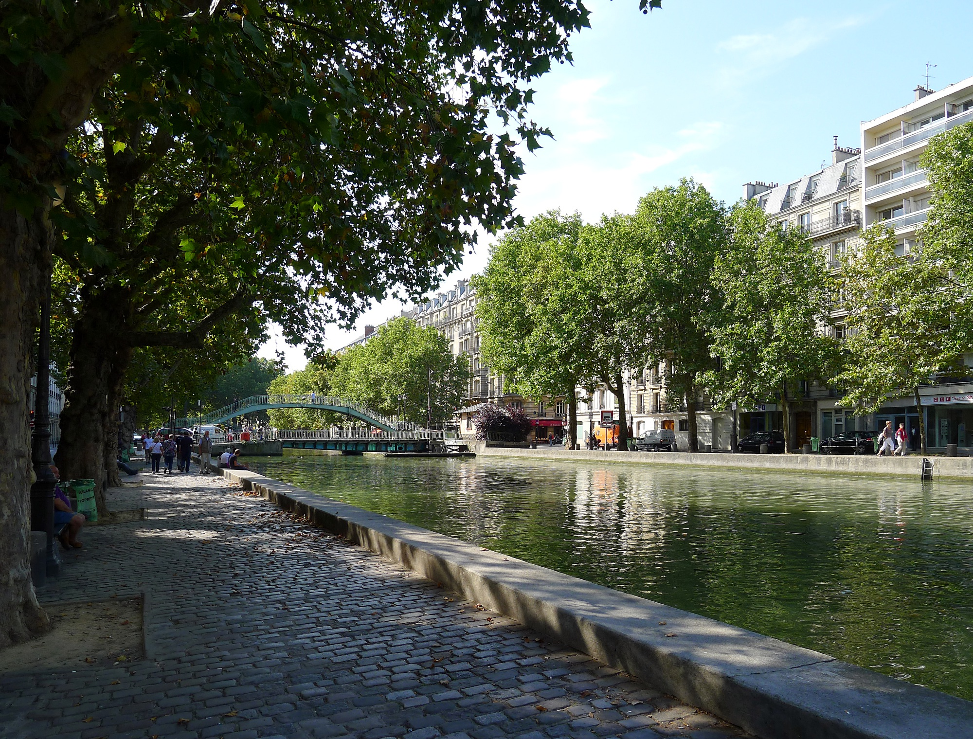 Canal Saint-Martin vu du quai de Jemmapes ; en arrière plan, le quai de Valmy - Paris X